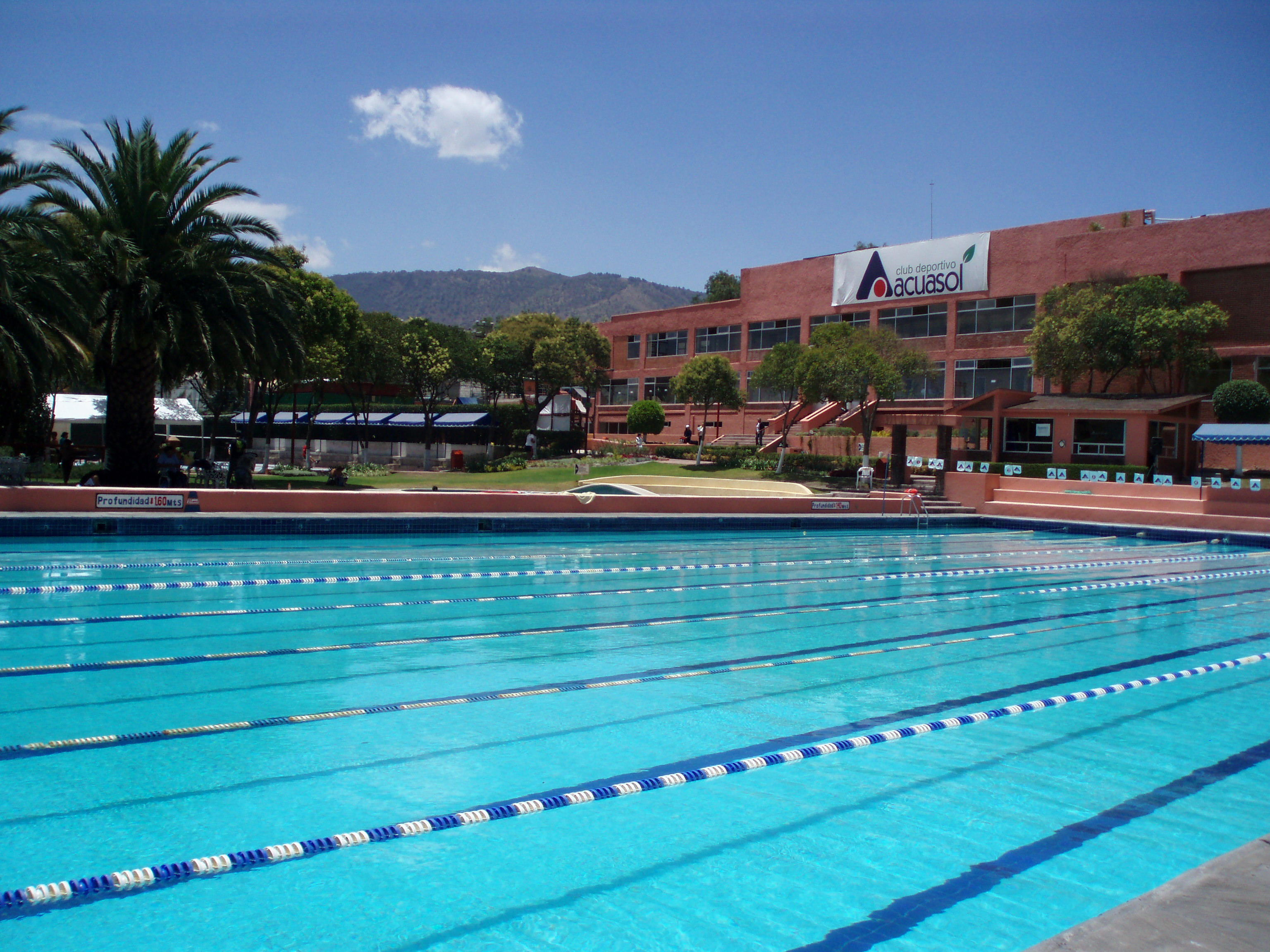 Acuasol